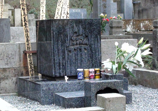 北鎌倉円覚寺で撮影した小津安二郎墓所の写真